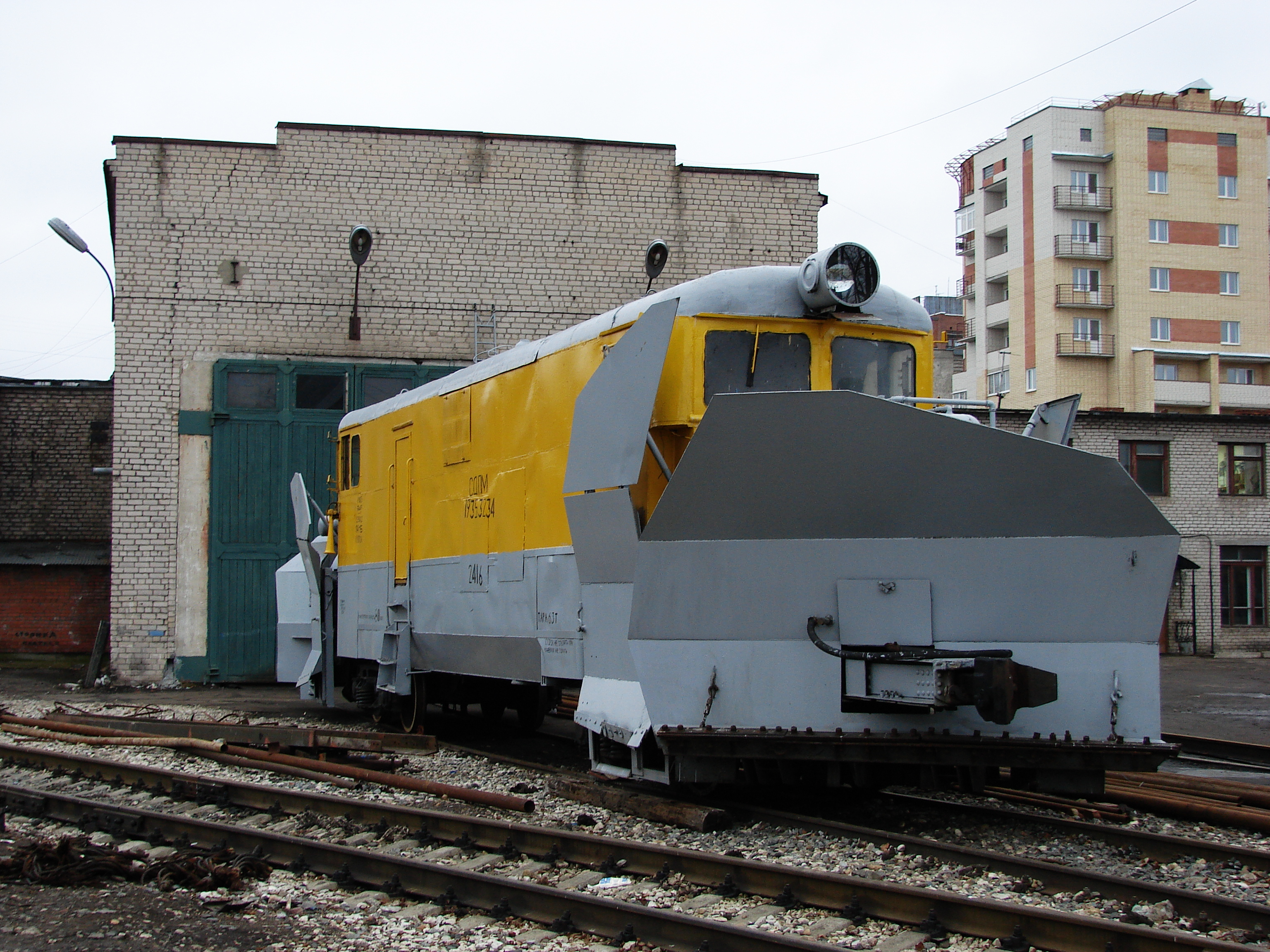 снегоочиститель СДПМ (вид справа) на станции Вологда-1